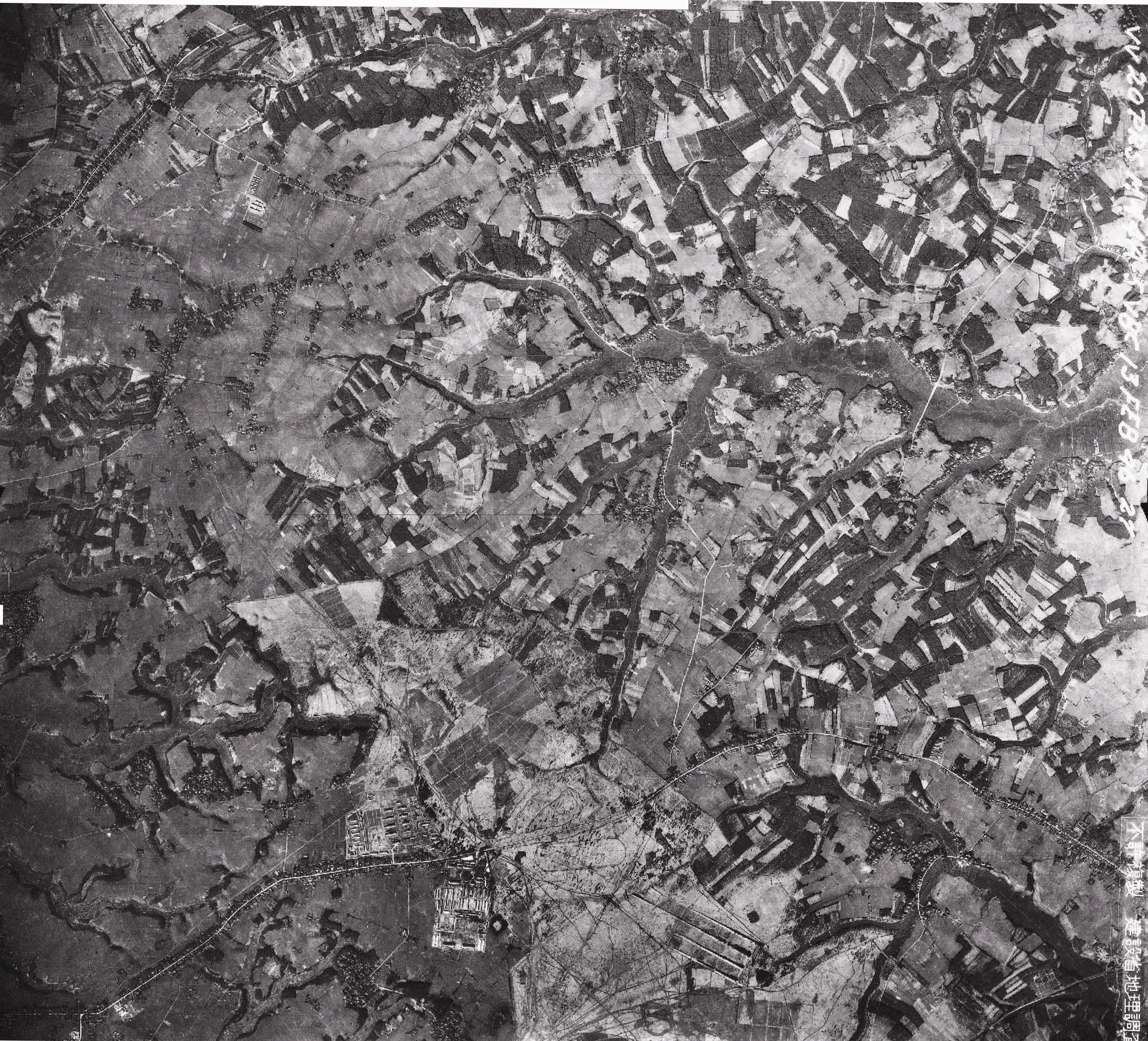 習志野原周辺の米軍による空撮写真